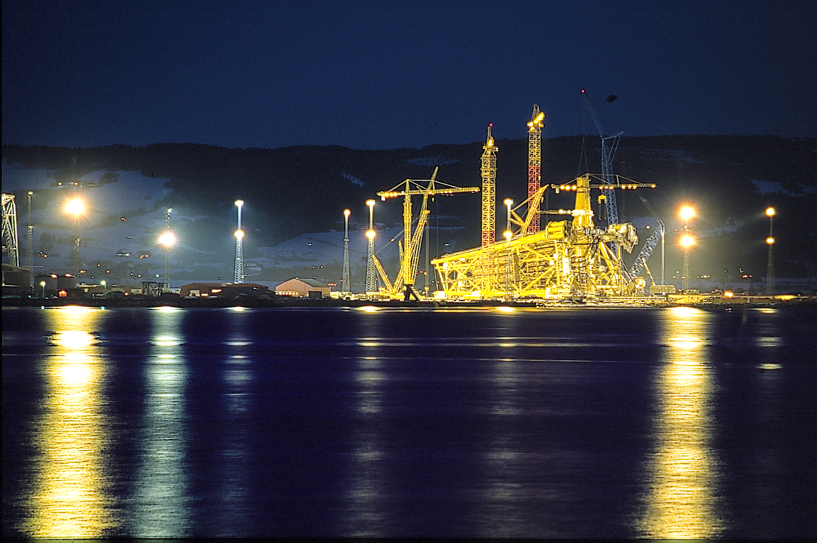 Aker Verdal